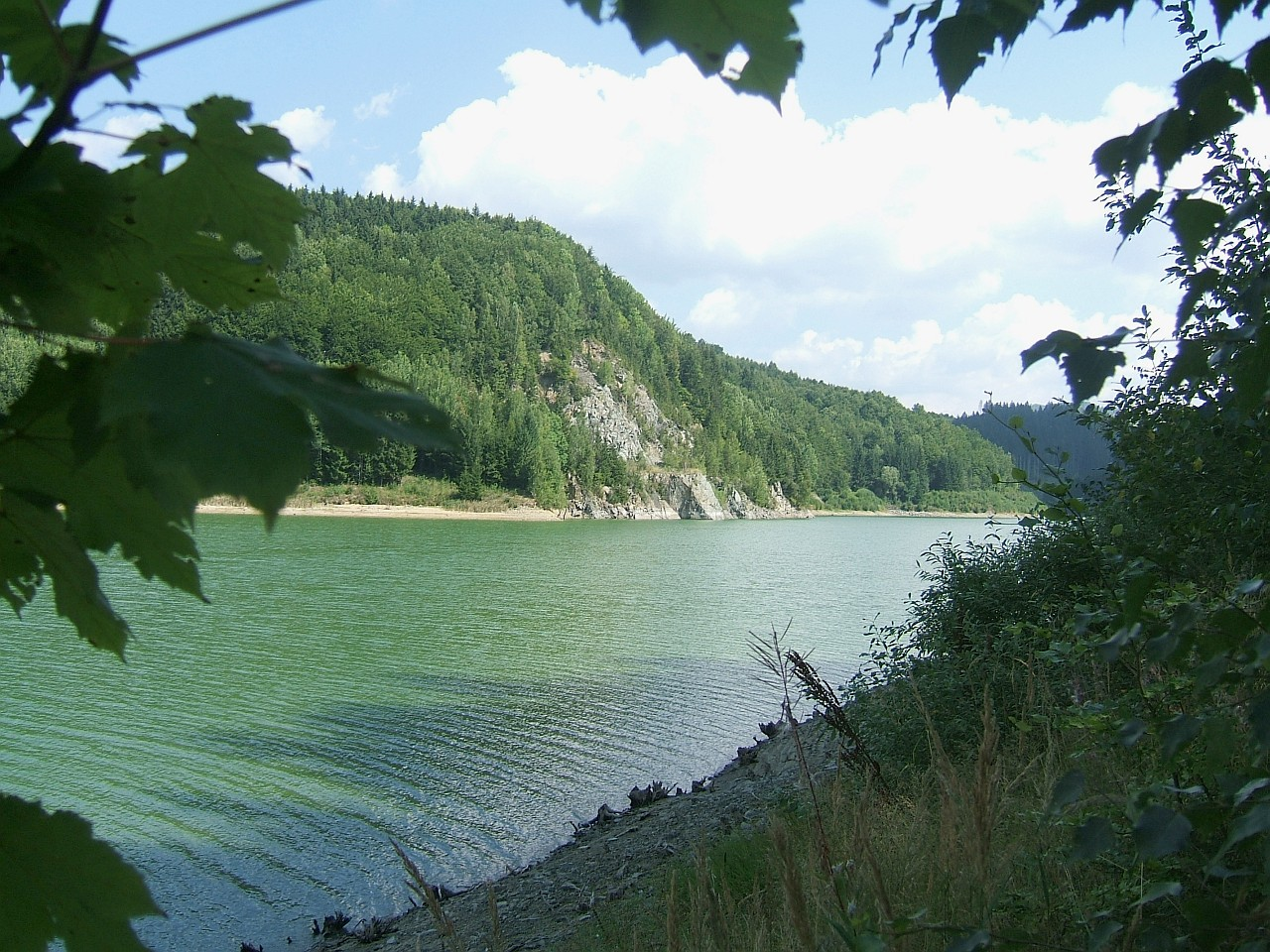 Hrinová - priehrada